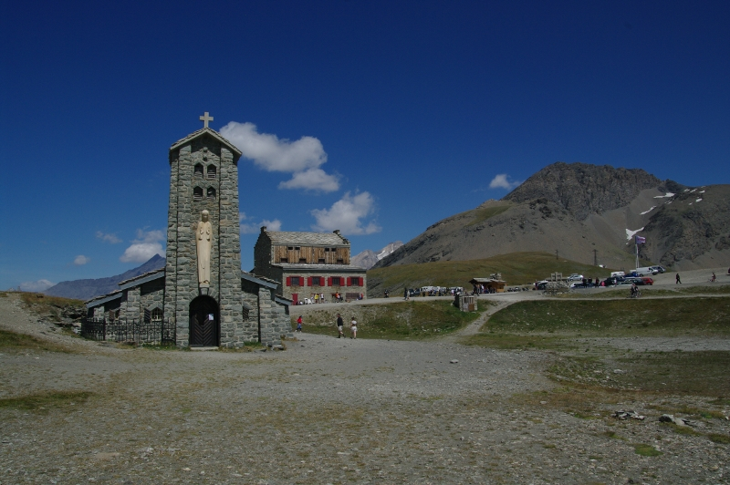 entre Maurienne et Tarentaise